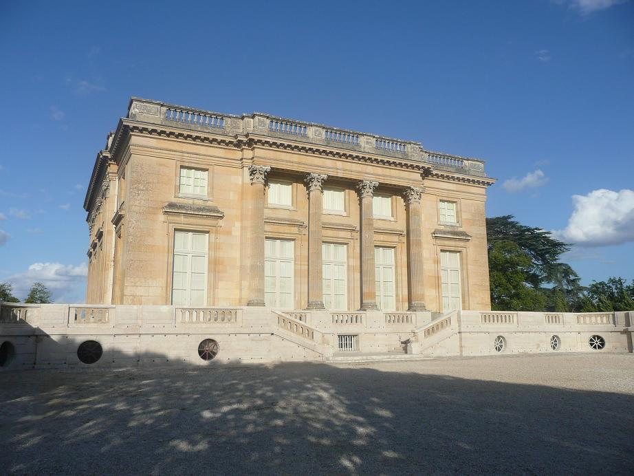 Le petit Trianon, façade ouest.